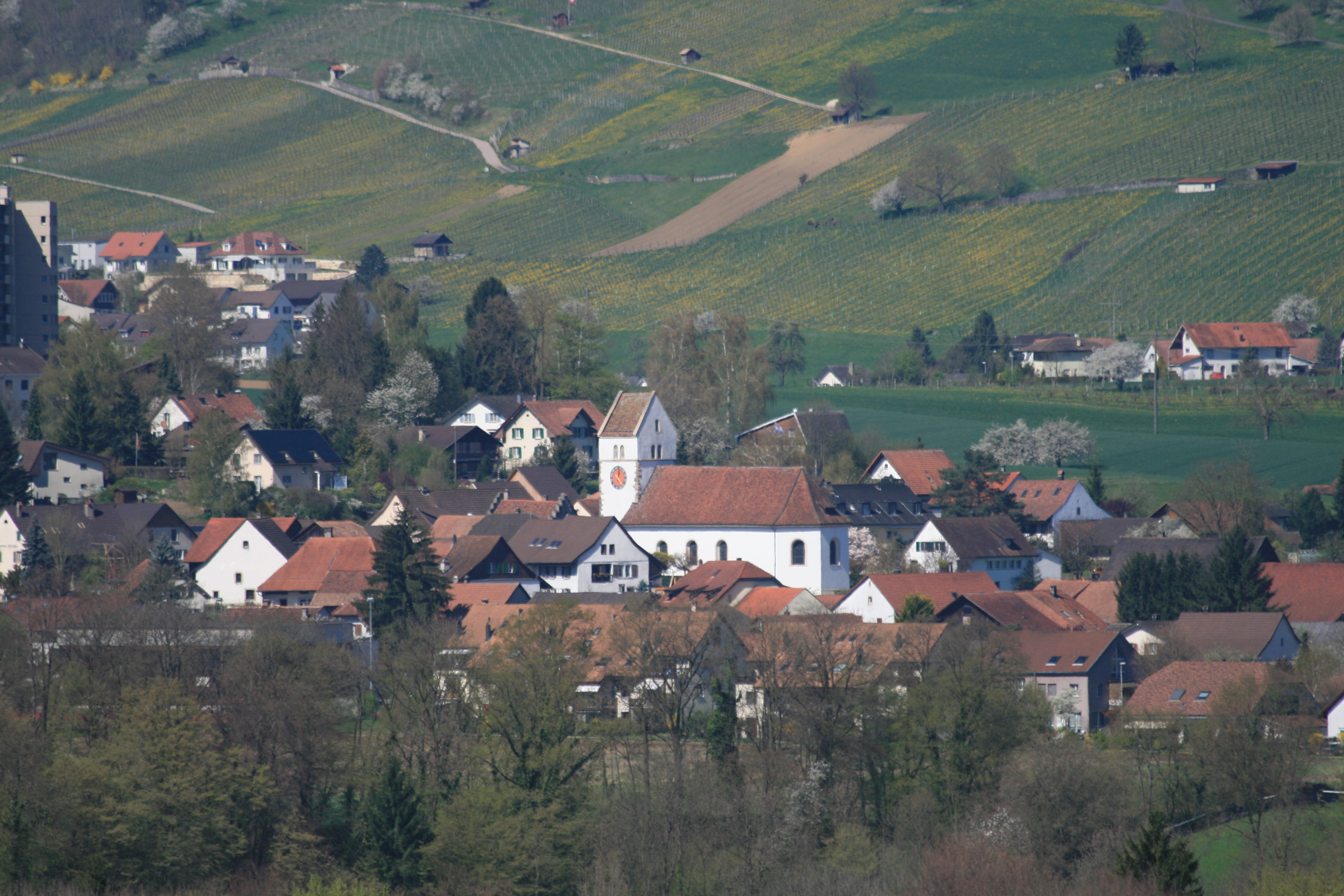 Veltheim mit der ref. Kirche